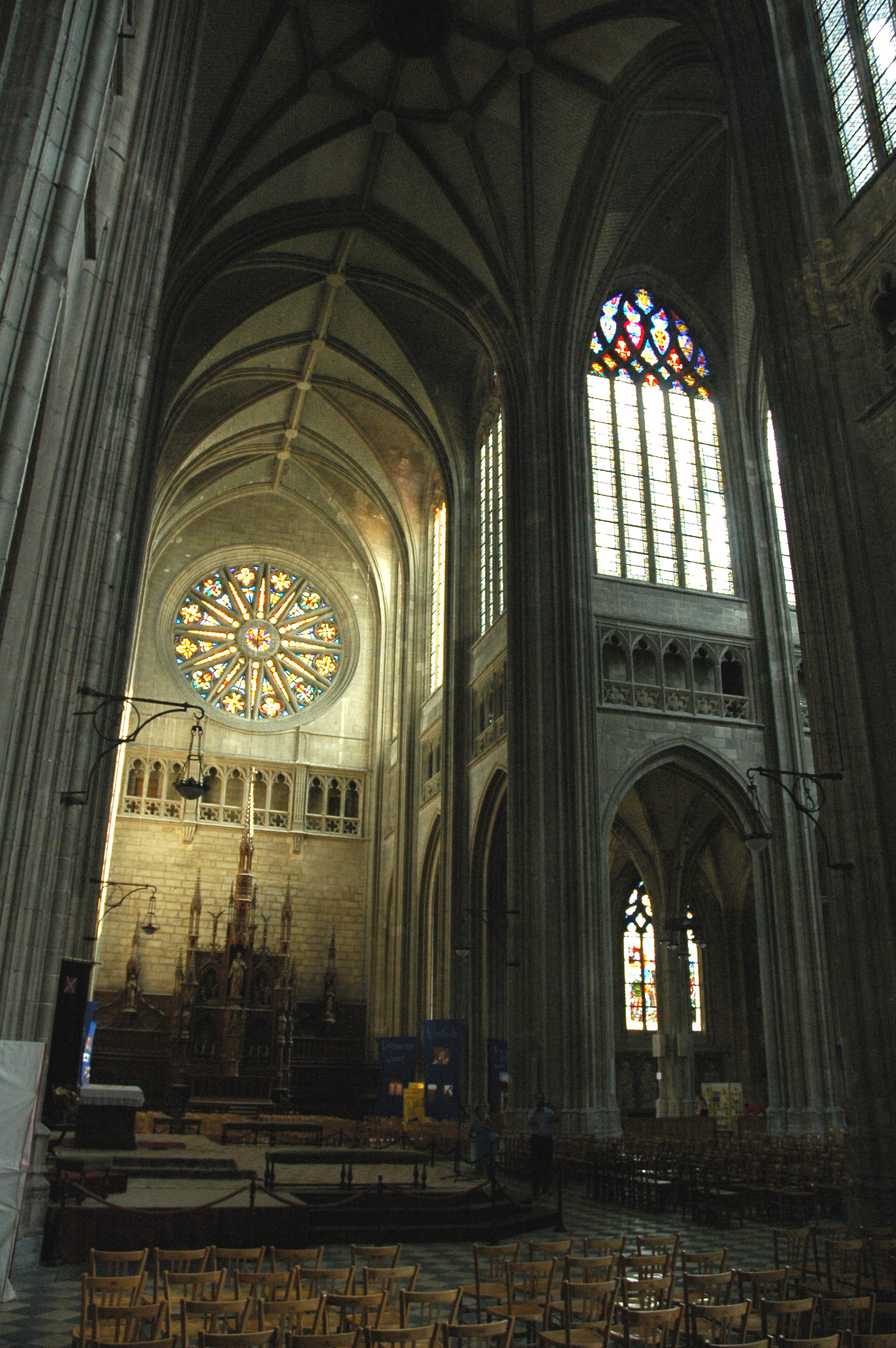 France Loiret Orléans Cathédrale Sainte-Croix Photographie prise par GIRAUD Patrick